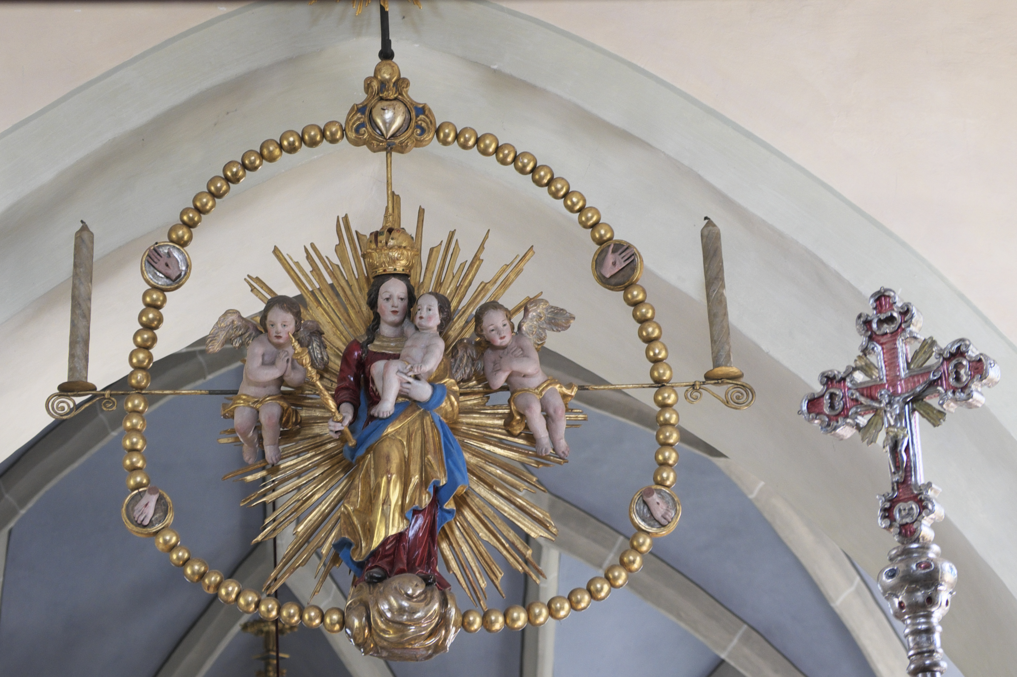 Katholische Filialkirche St. Valentin in Percha, einem Ortsteil von Starnberg, im Landkreis Starnberg (Bayern/Deutschland), Rosenkranzmadonna, um 1700